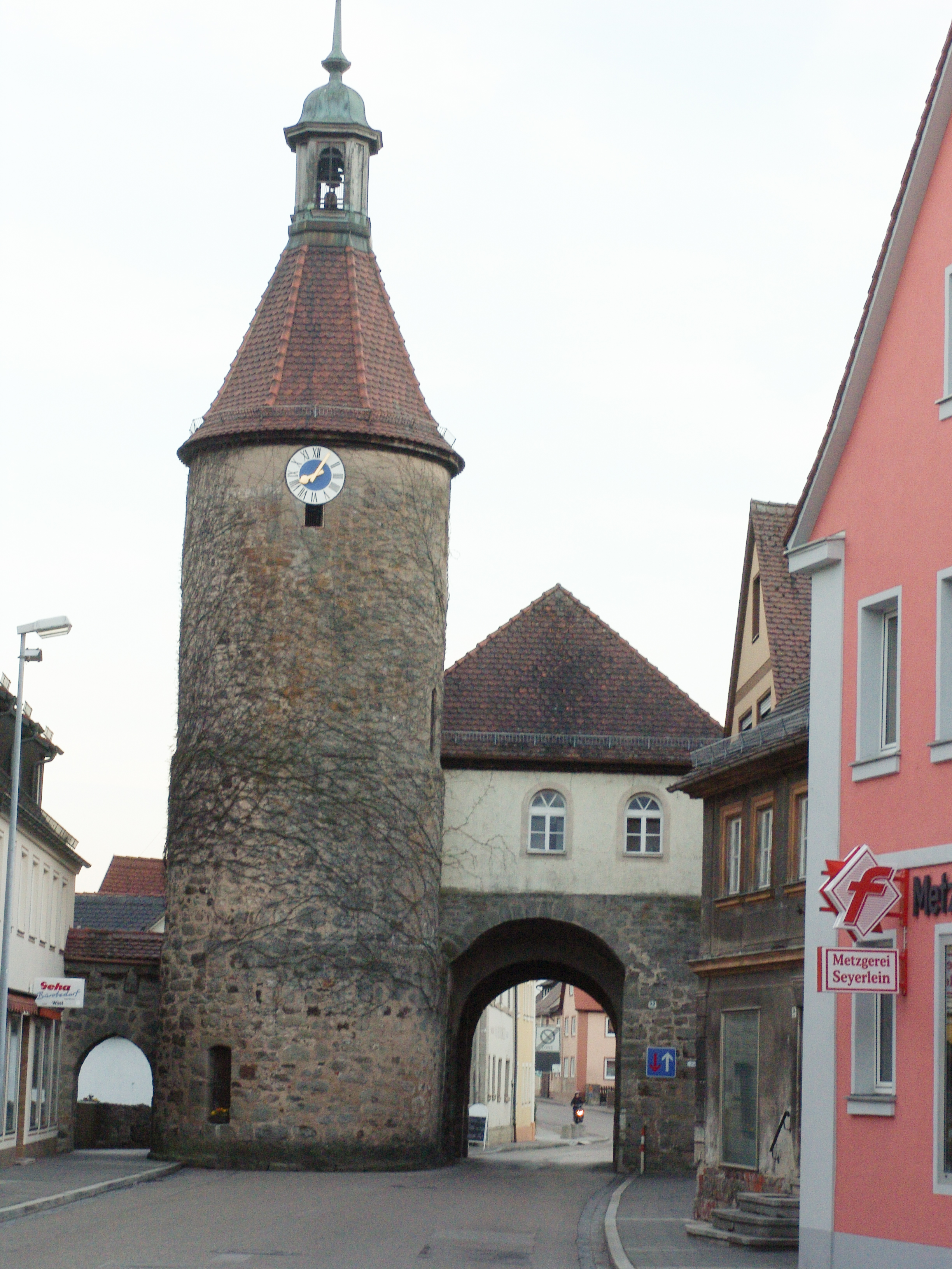 Leutershausen, Am Markt 22